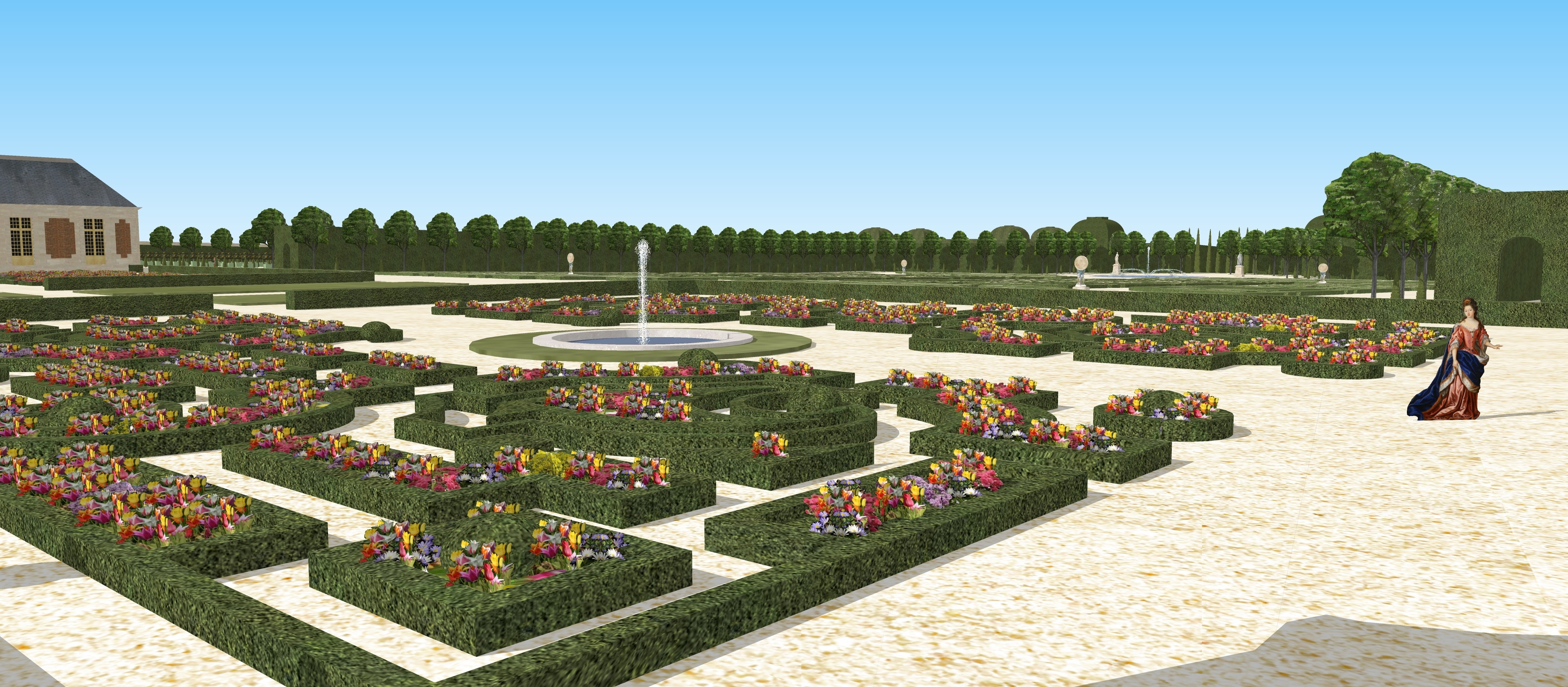 Vue du parterre de fleurs en sortant du Grand Salon, vers 1660